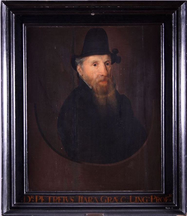 Portret in olieverf van Petrejus Tiara. Professor Grieks aan de Franeker universiteit van 1585 tot 1586. Petrejus Tiara (Workum 15 juli 1514 - Franeker 9 februari 1586) studeerde in Leuven geneeskunde en bezocht Duitse, Franse en een Italiaanse universiteit. Hij werkte als arts in Delft en Franeker alvorens hij in Douai tot hoogleraar Grieks werd benoemd. In 1575 werd hij de eerste rector magnificus van de nieuwe universiteit van Leiden. Tiara was al 74 jaar toen hij tien jaar later in Franeker werd aangesteld als professor Grieks. (Tekst: Museum Martena)